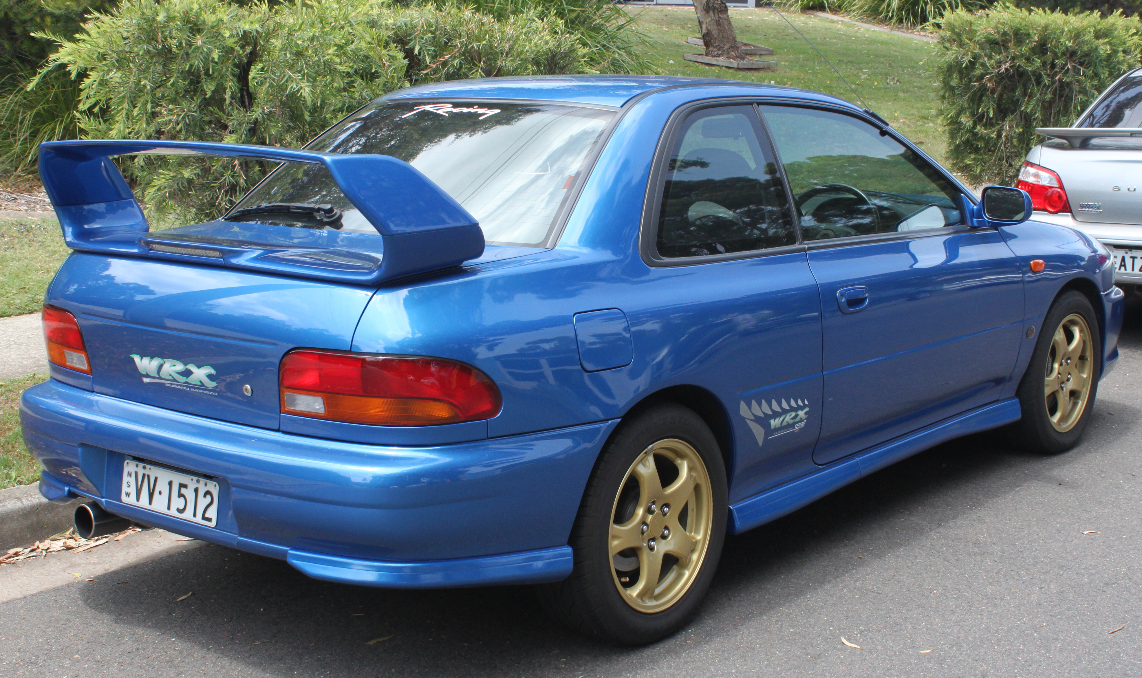 Subaru Impreza N WRX STi Version 5 Coupe